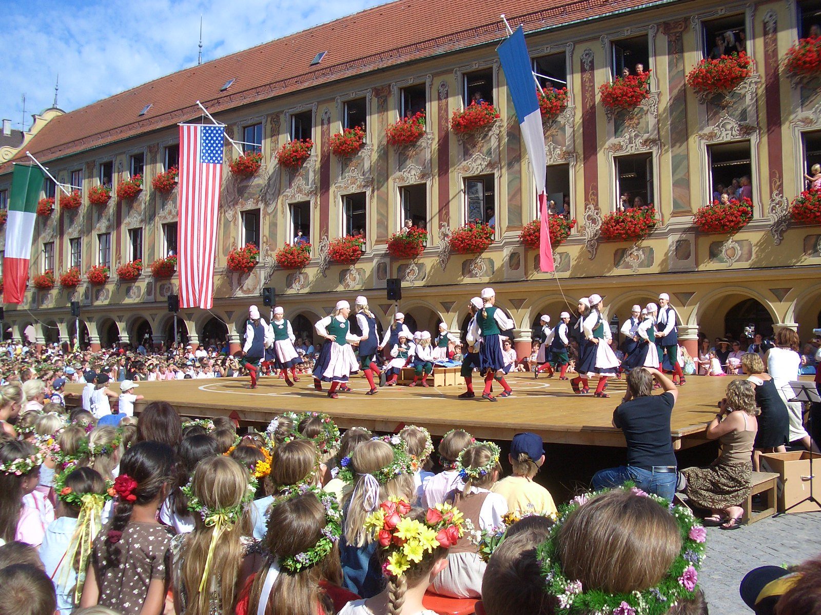 Das Memminger Kinderfest am Marktplatz